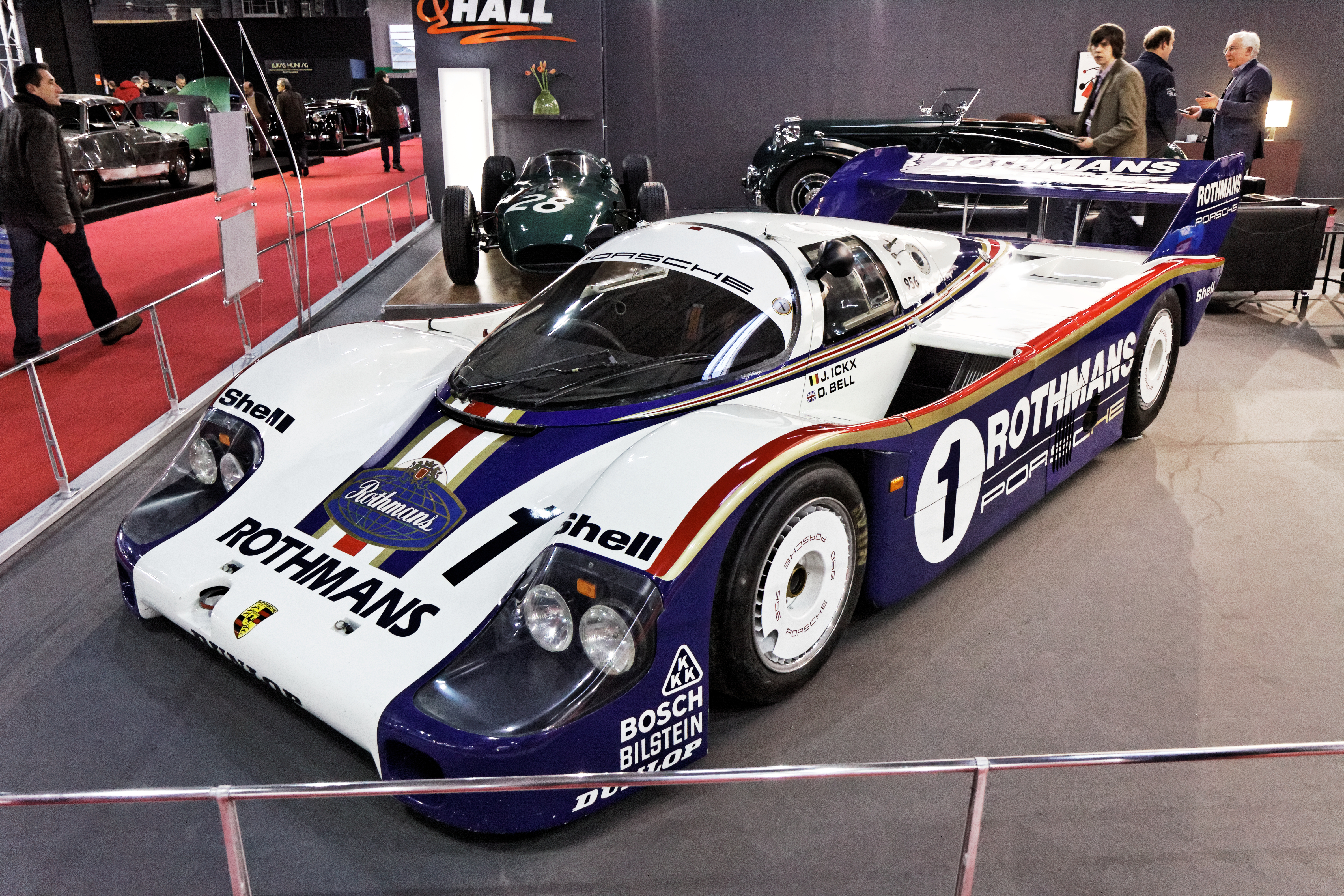 Une Porsche 956 présentée lors du salon Retromobile 2013.